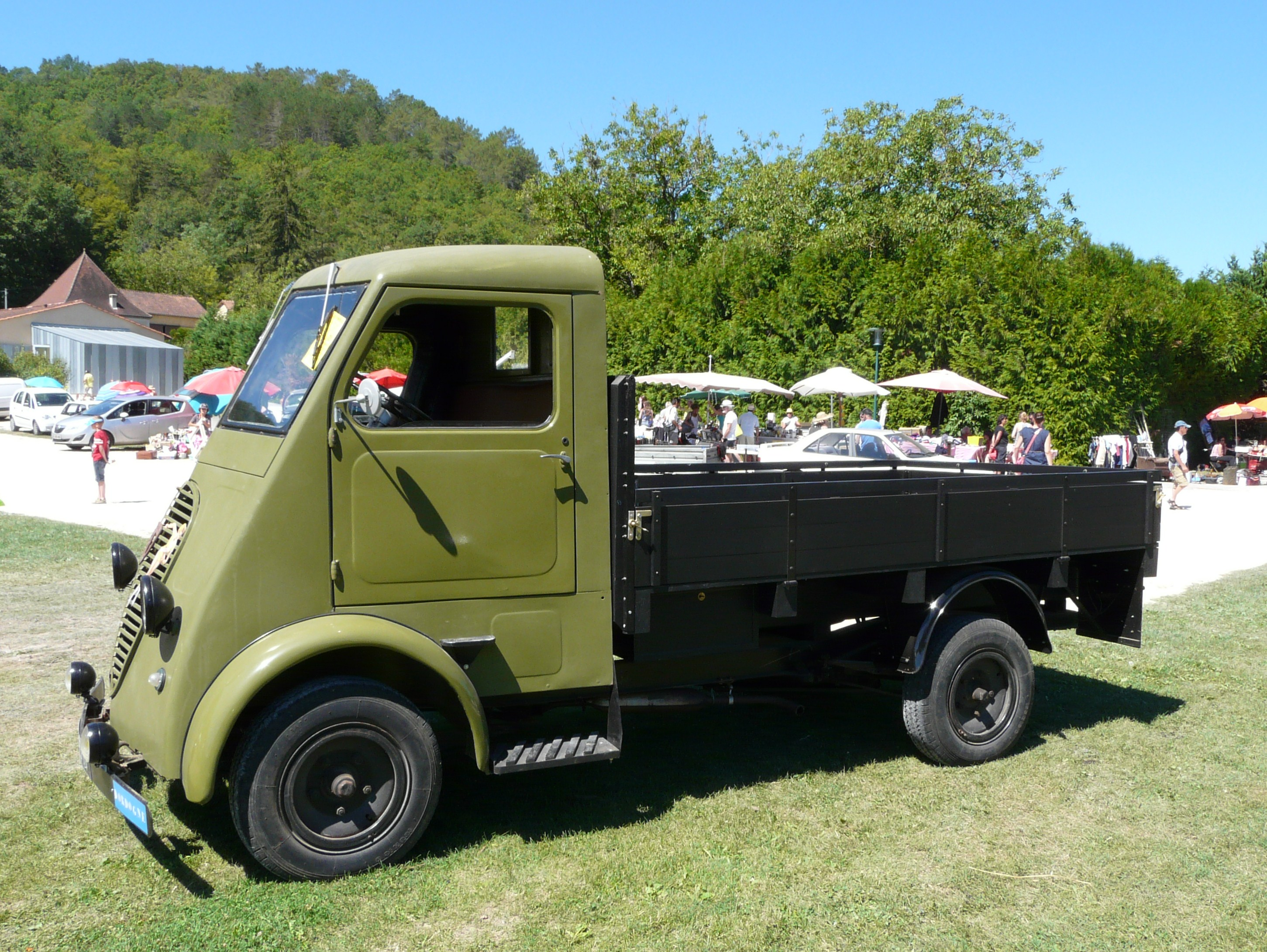 Peugeot Q3A, fête des battages 2016 à Saint-Cybranet, Dordogne, France.